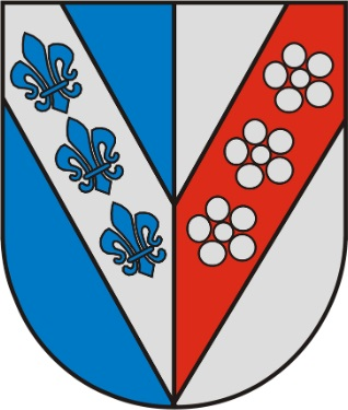 Wappen der Gemeinde Ranten in Österreich